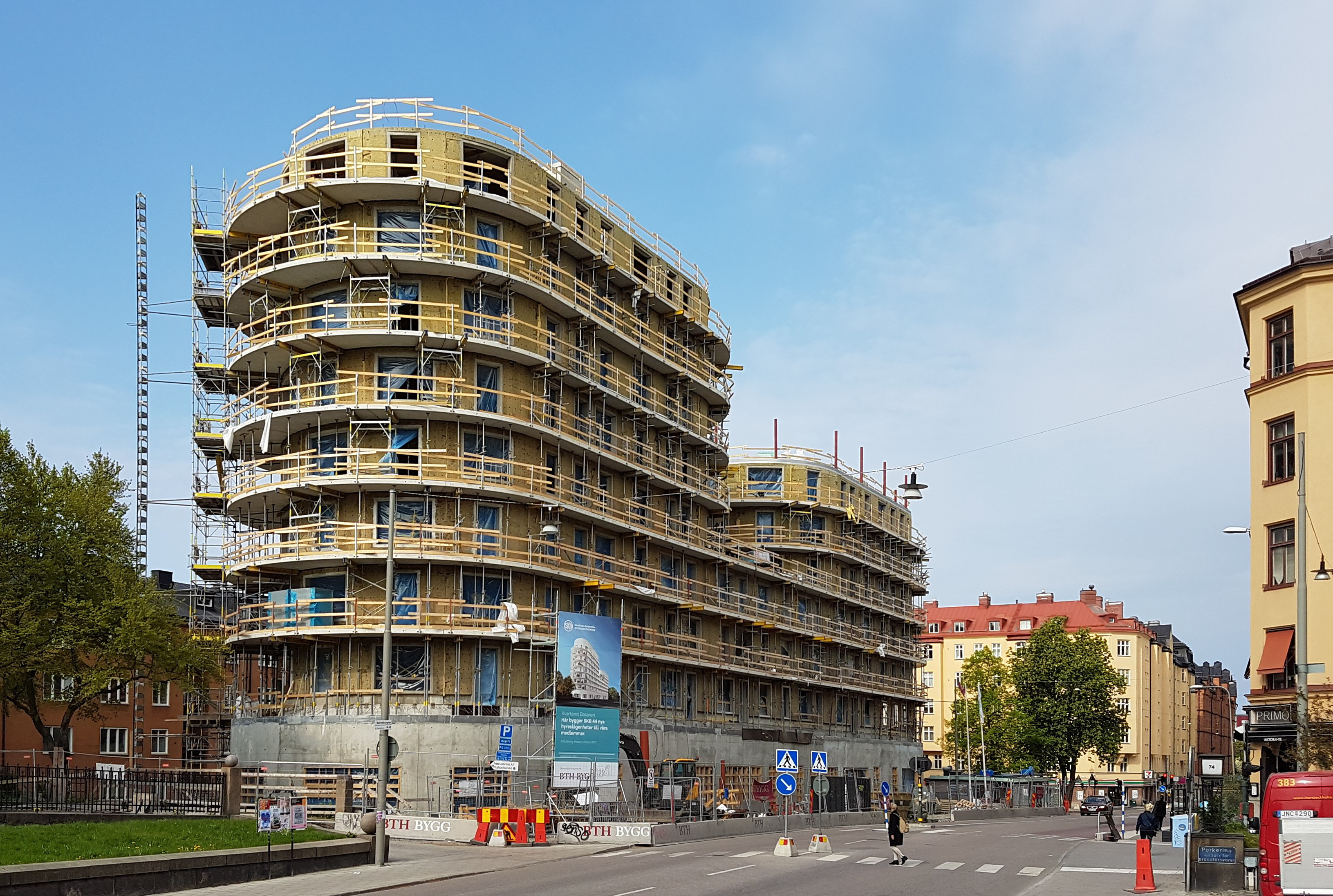 Nytt hus i kvarteret.